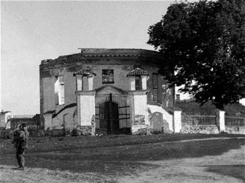 Беларуская (тарашкевіца): Германавічы (Hiermanavičy). Капліца Сьвятых апосталаў Пятра і Паўла